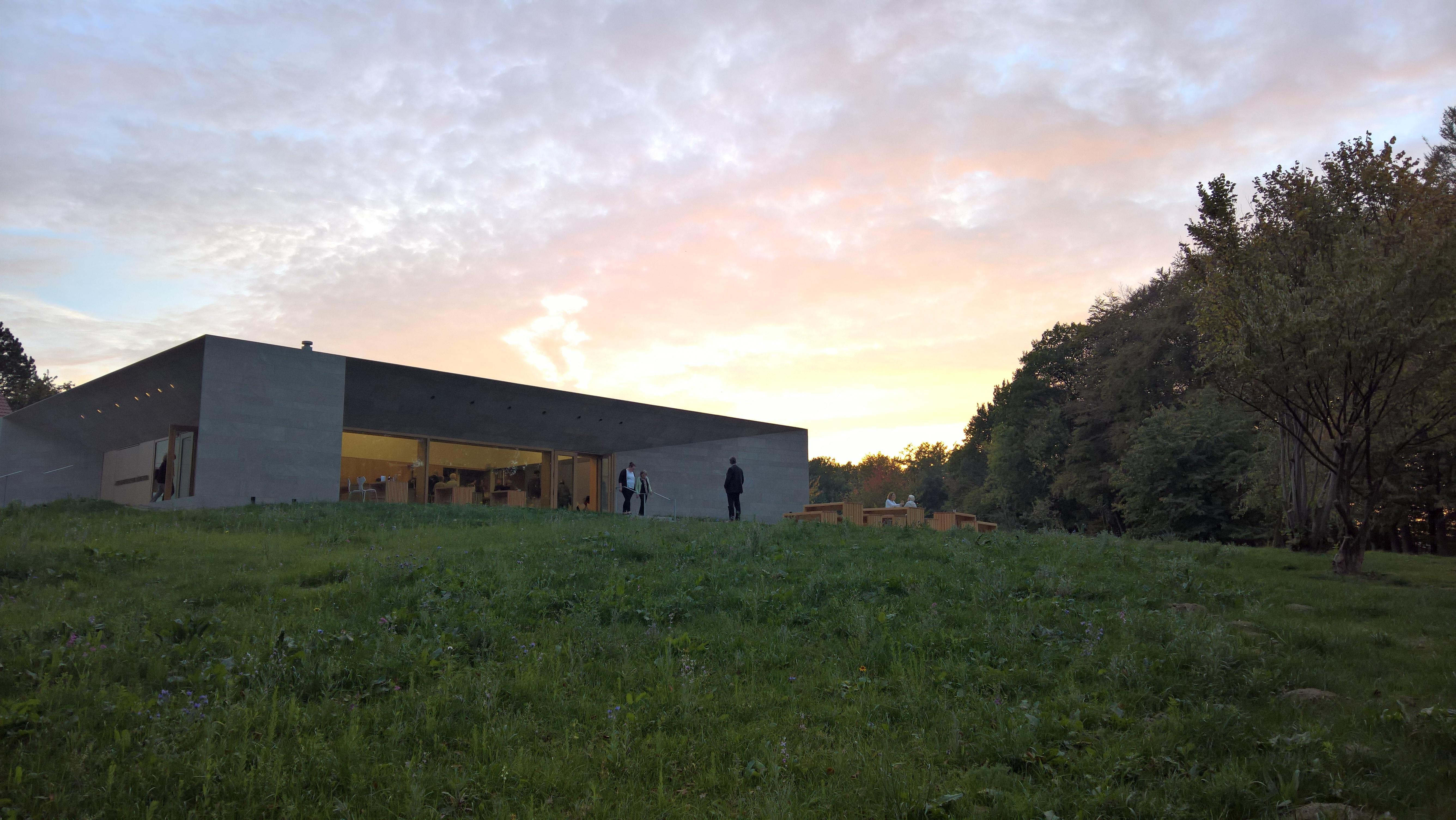 Museum Peter August Böckstiegel bei Werther 2018, von der Streuobstwiese aus gesehen.